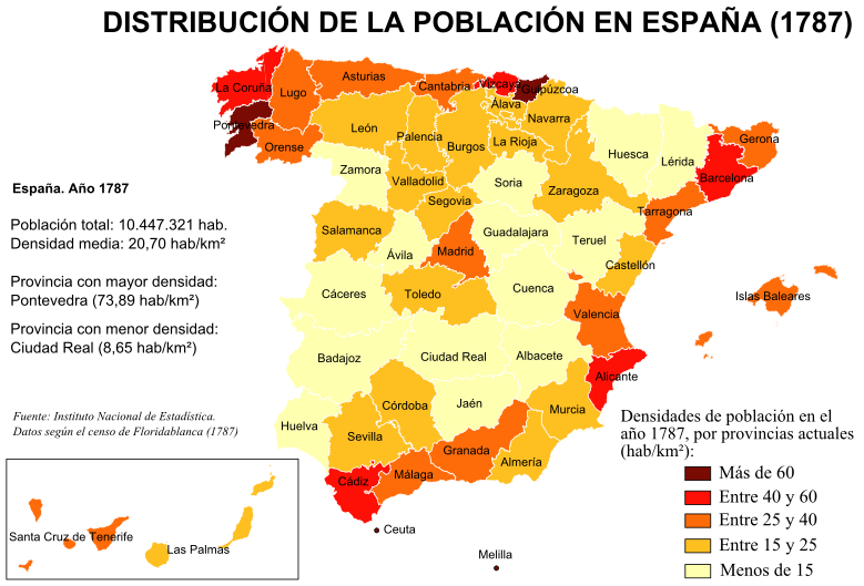 Mapa de España con las densidades de población por provincias actuales, según el censo de Floridablanca, realizado en 1787.